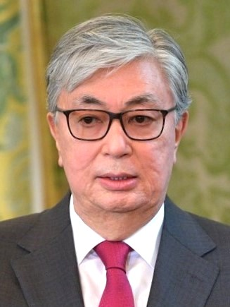 Президент Республики Казахстан Касым-Жомарт Токаев во время встречи с Президентом Российской Федерации Владимиром Путиным